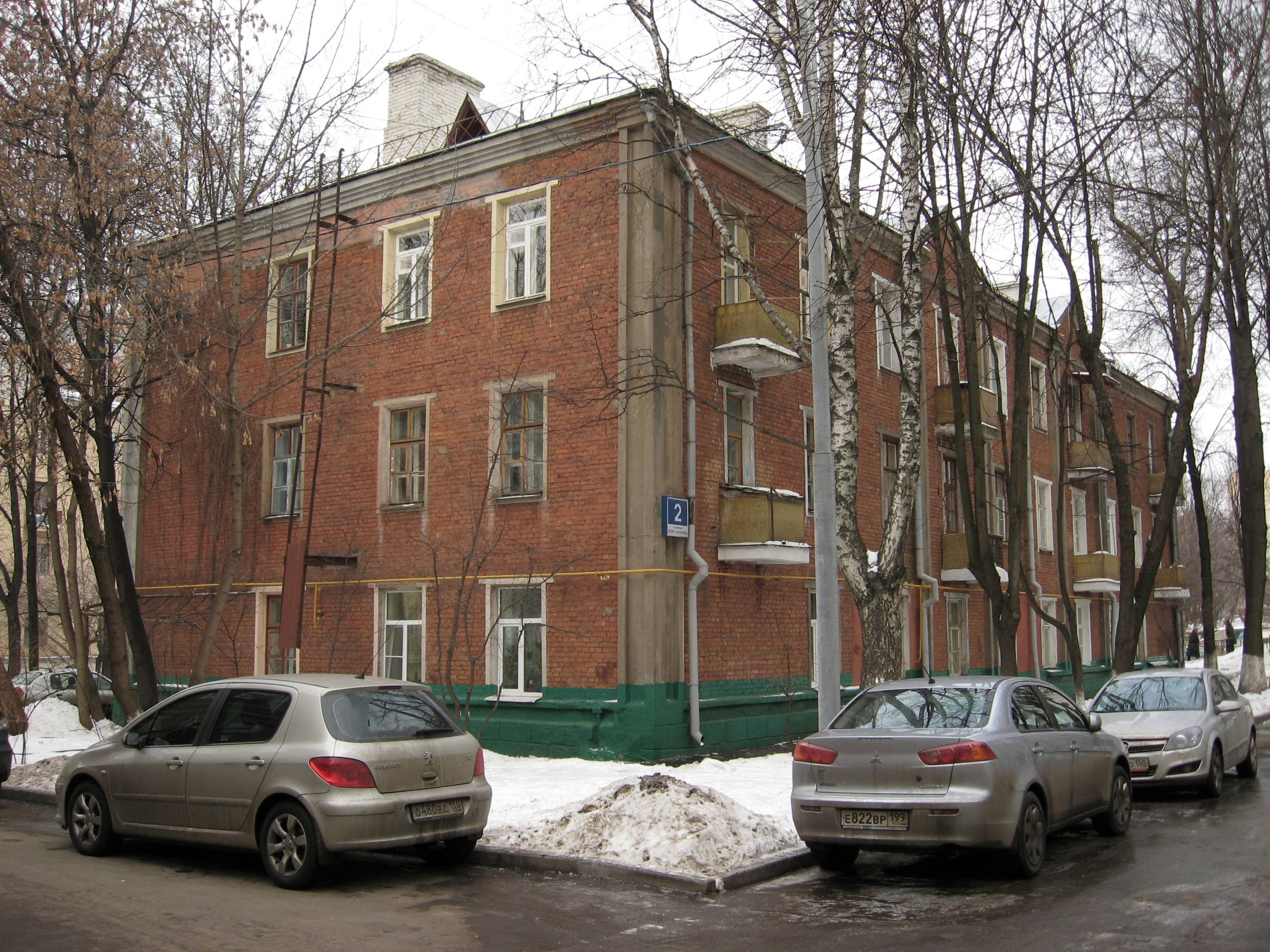 1-й переулок Петра Алексеева, дом 2, Москва